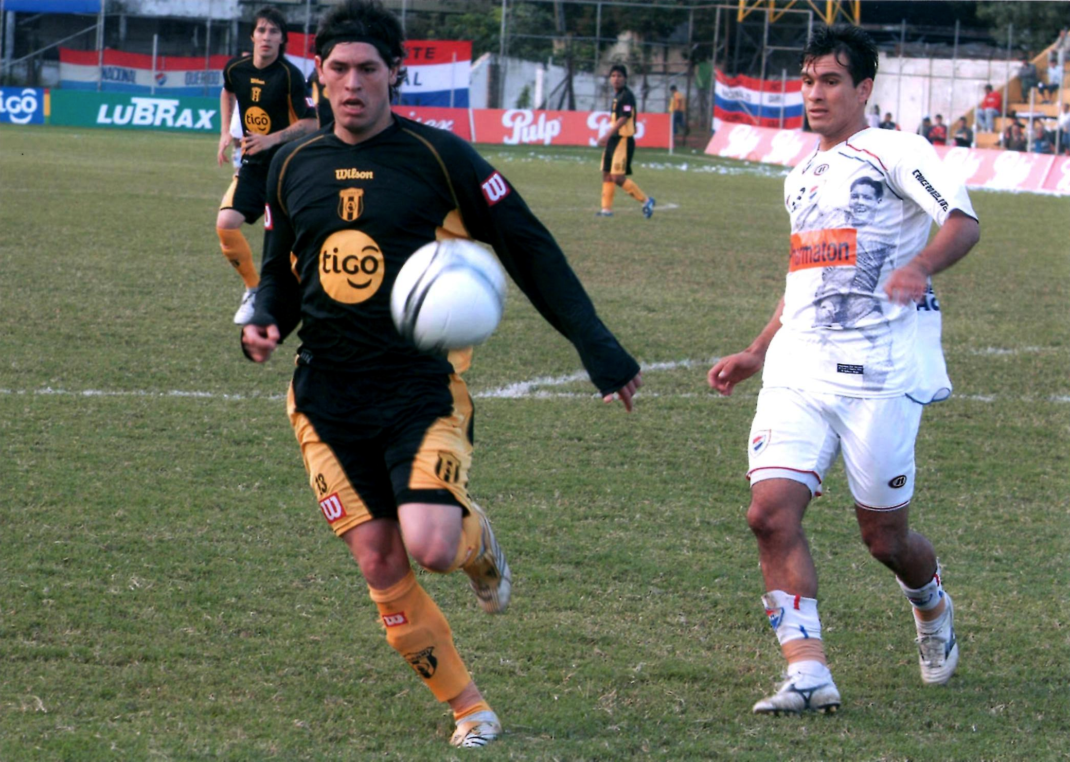 Paulo Centurion del Club Guarani cubriendo el balon tras el asecho del rival del Club Nacional (Paraguay)